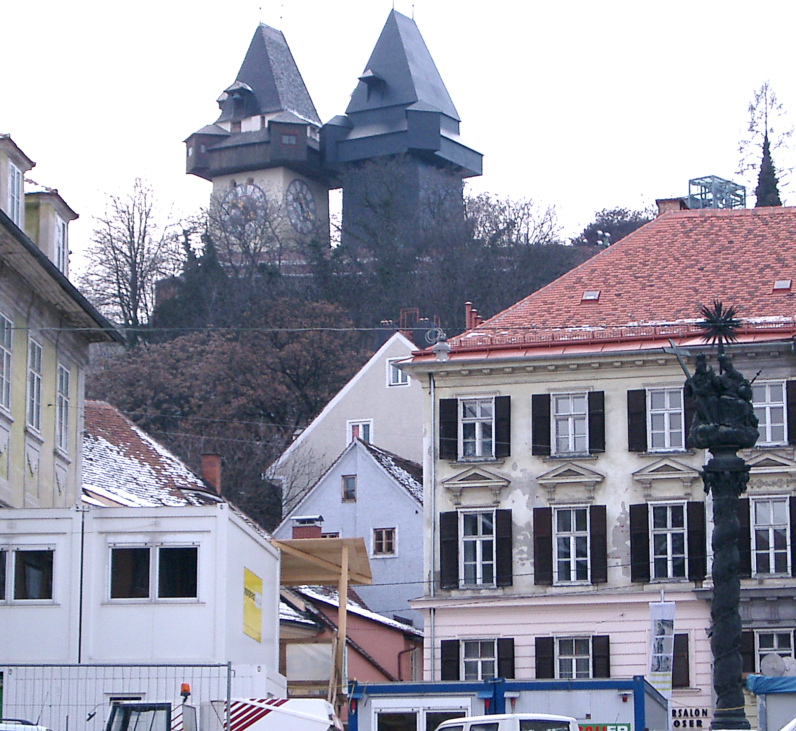 Graz Uhrturm 2003: Uhrturmschatten von Markus Wilfing